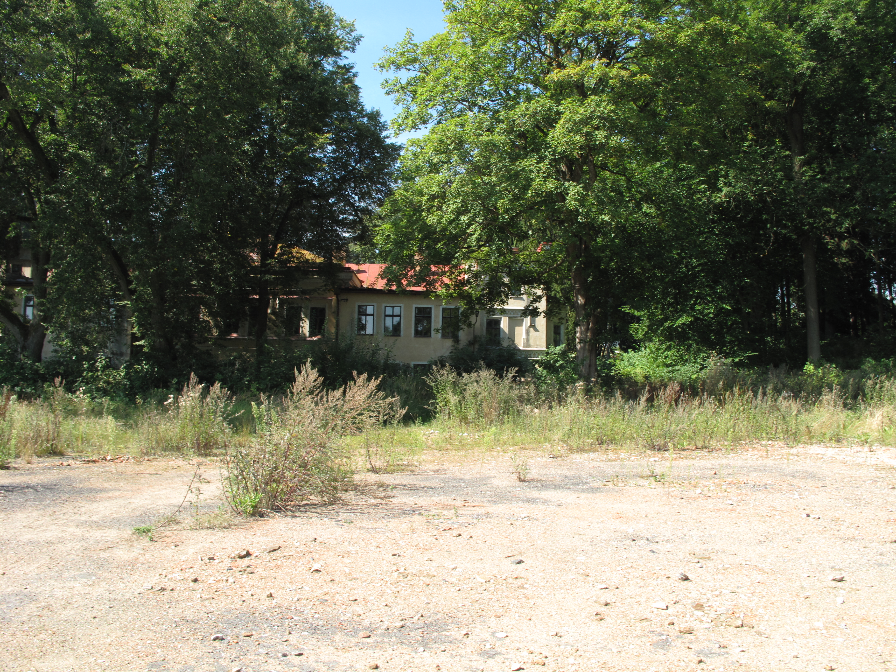 Zámek Oblajovice v Oblajovicích. Okres Tábor, Česká republika.